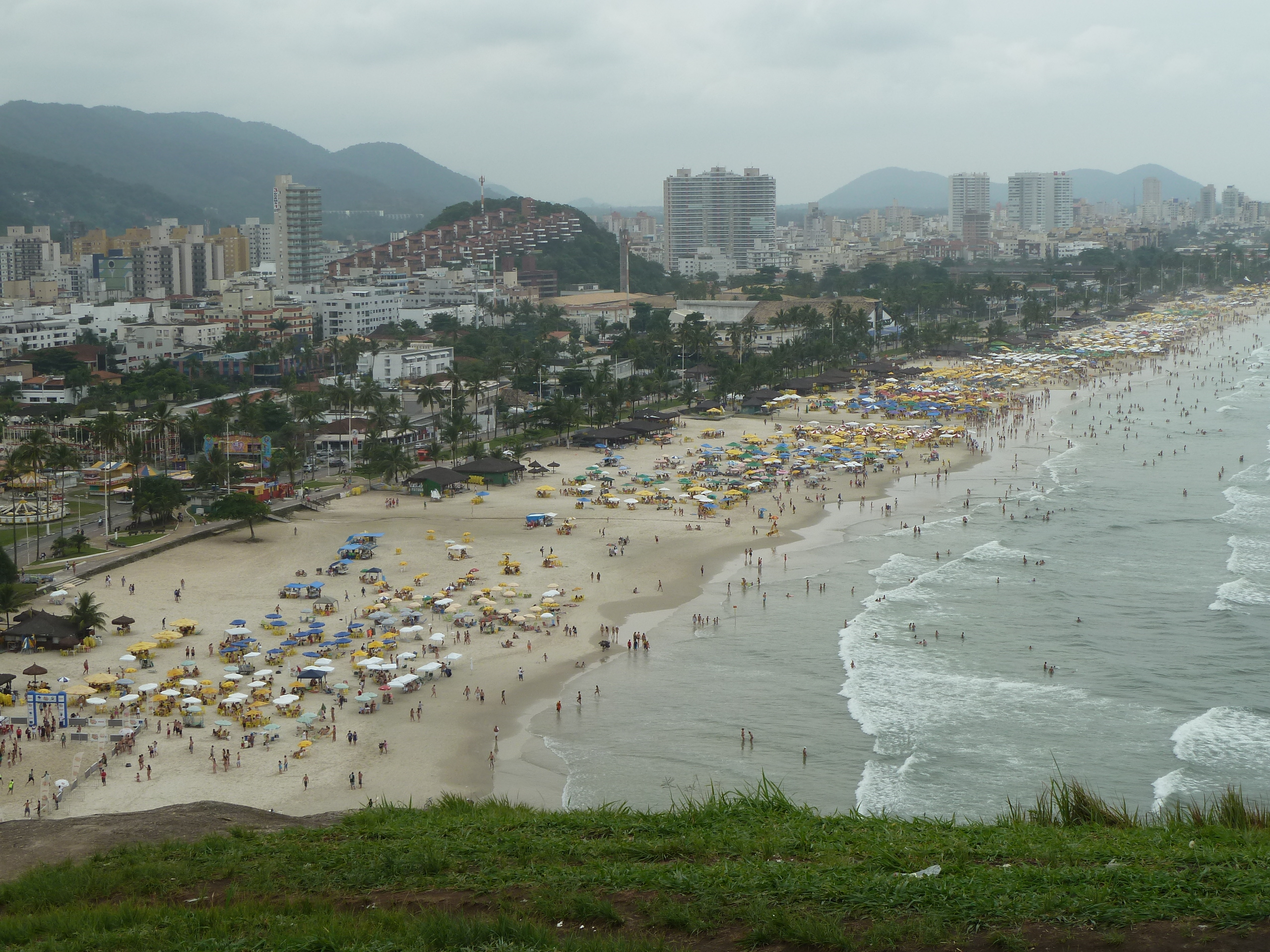 Guarujá, Praia da Enseada